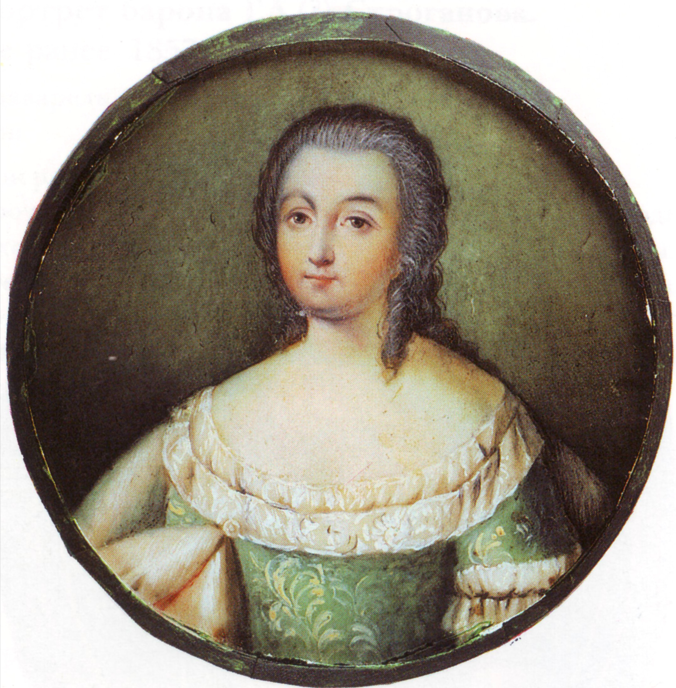 Portrait of Natalya Dolgorukova (née Sheremeteva) (Russian: Наталья Долгорукова)